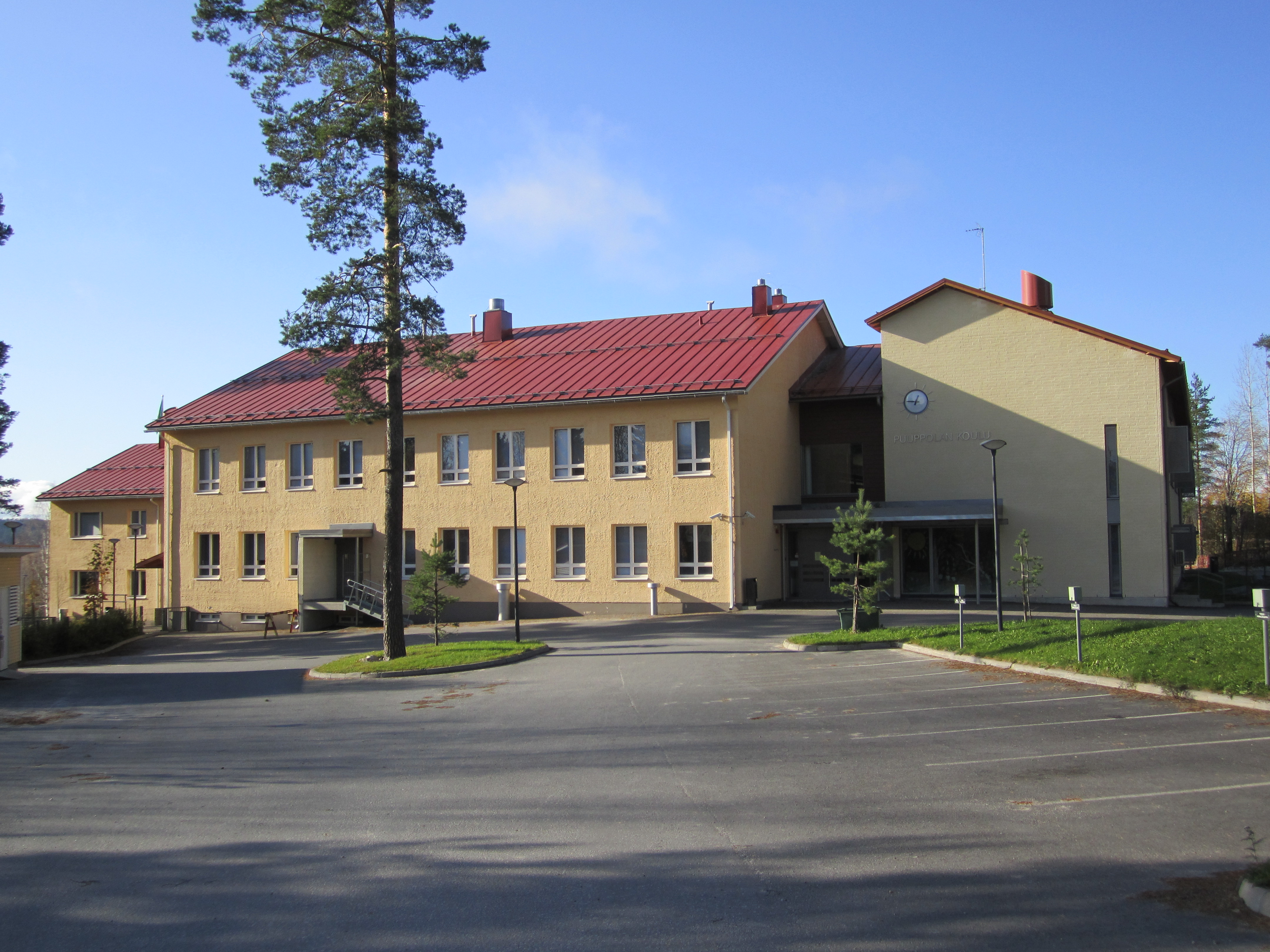 Puuppolan koulu